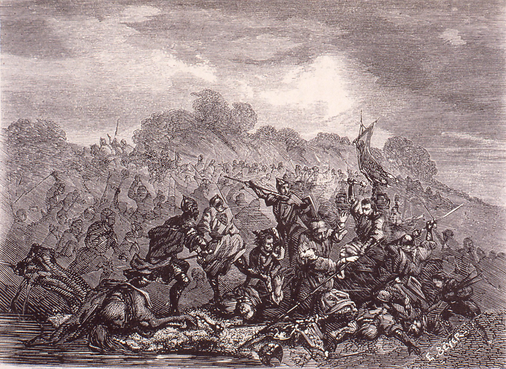 Dessin de la bataille de Hausbergen